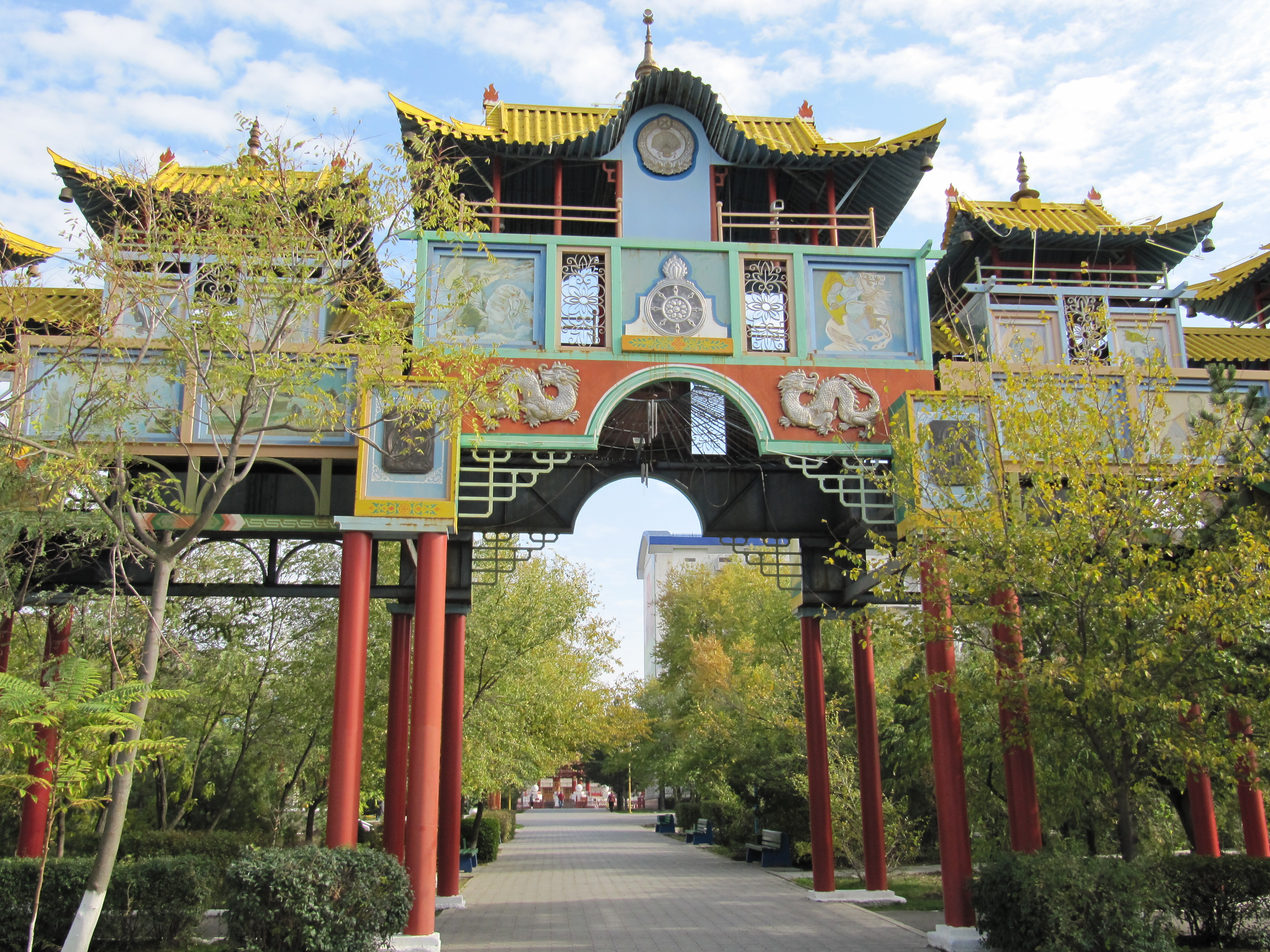 Золотые ворота, Элиста, Калмыкия